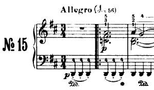 Compassos iniciais do primeiro movimento da Sonata Op. 28, de Beethoven